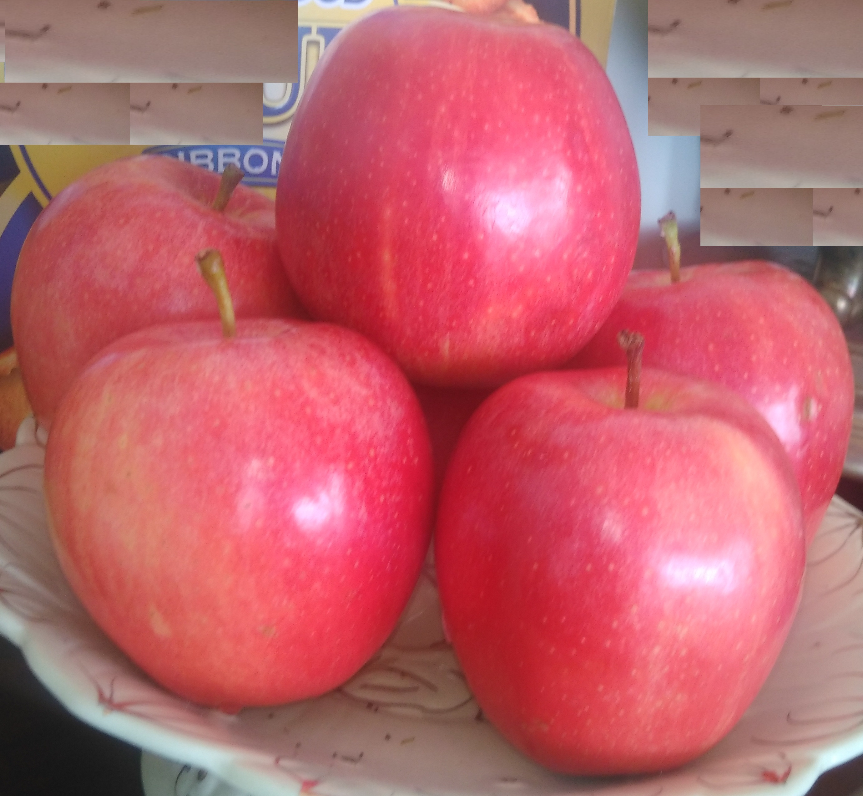 Hình chụp bằng máy ảnh cá nhân về giống táo Trung Quốc (táo Phú Sĩ), loại táo này đã được tẩm ướp hóa chất nên có thời gian bảo quan lên đến 2 tháng